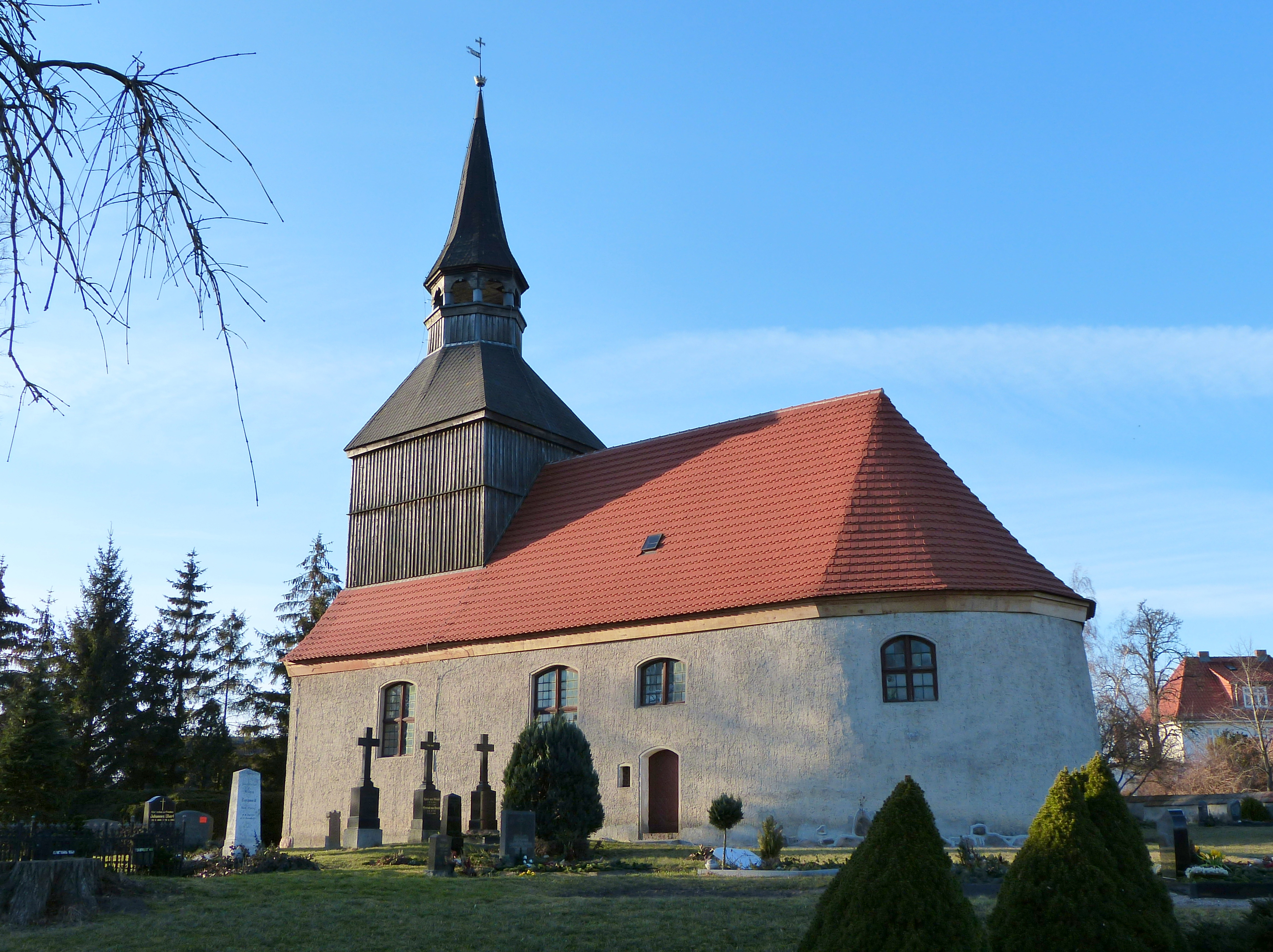 Kirche Alt Tellin, Südseite